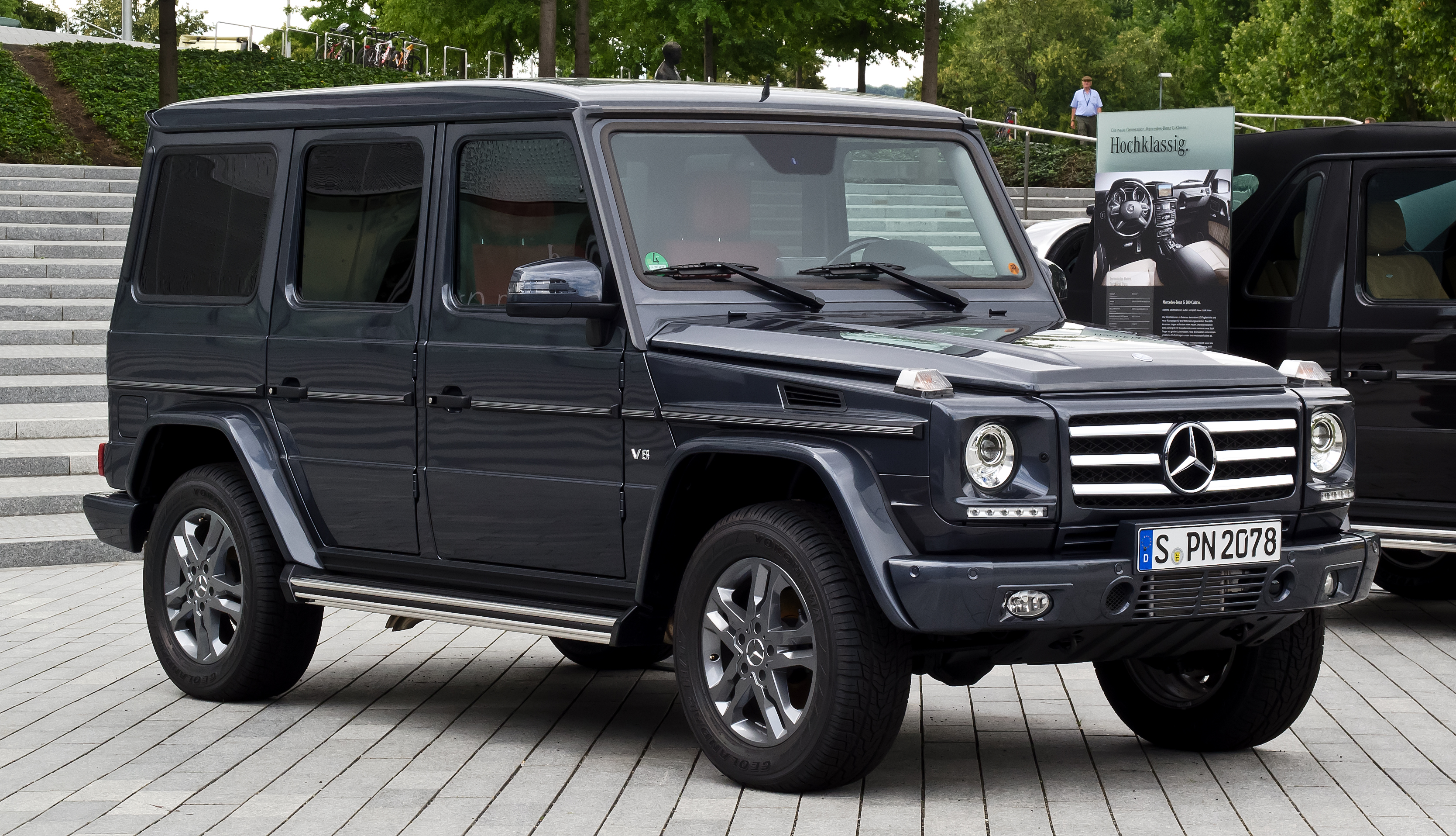 Mercedes-Benz G 500 Sport-Paket (W 463, 3. Facelift)